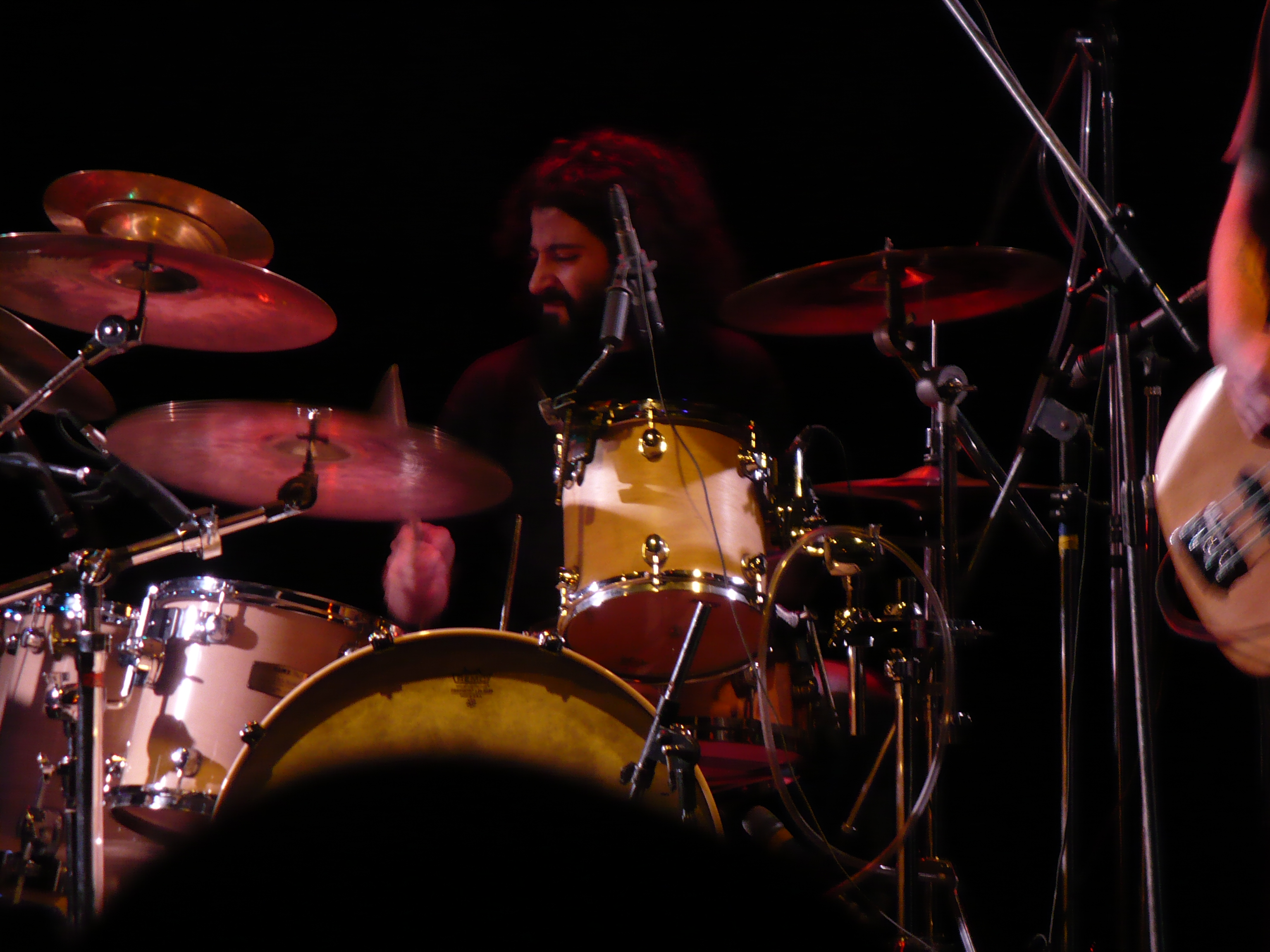 Foto tomada durante el recital de Pez en el teatro Stella Maris, junio 2007.